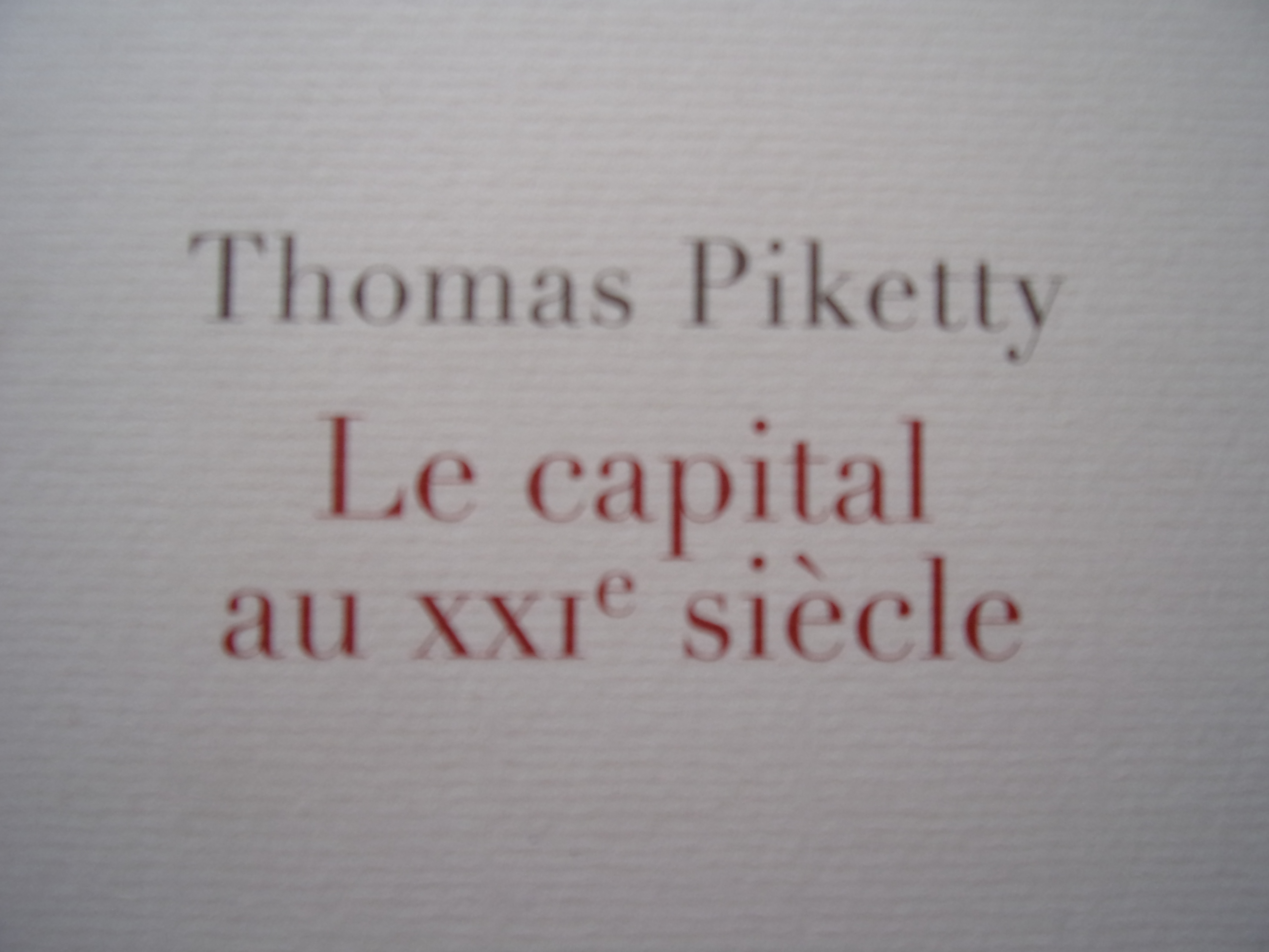 Indication du nom de l'auteur et du titre